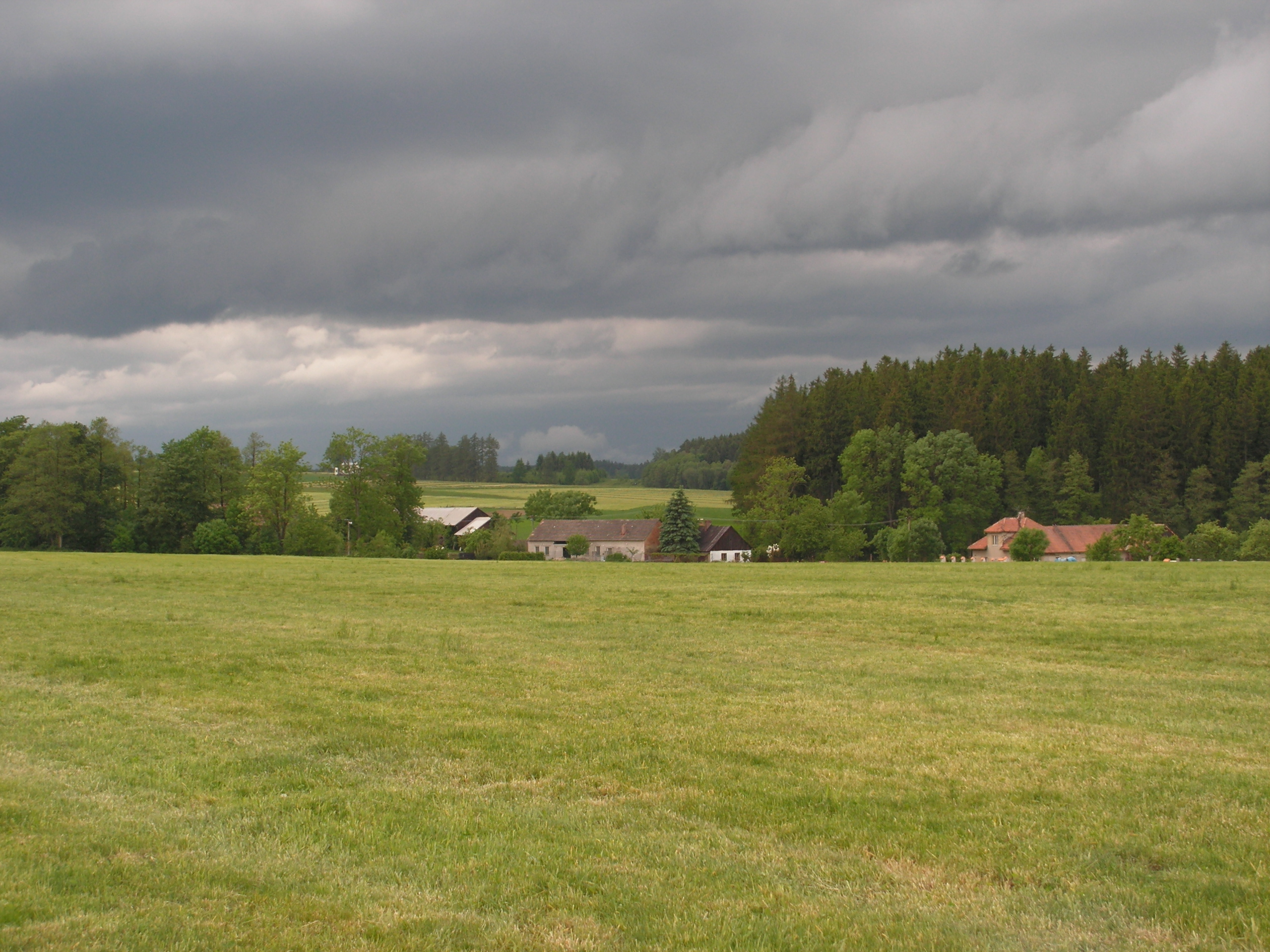 Vesnice Hroznětín se nachází severovýchodně od obce Číhošť v okrese Havlíčkův Brod.